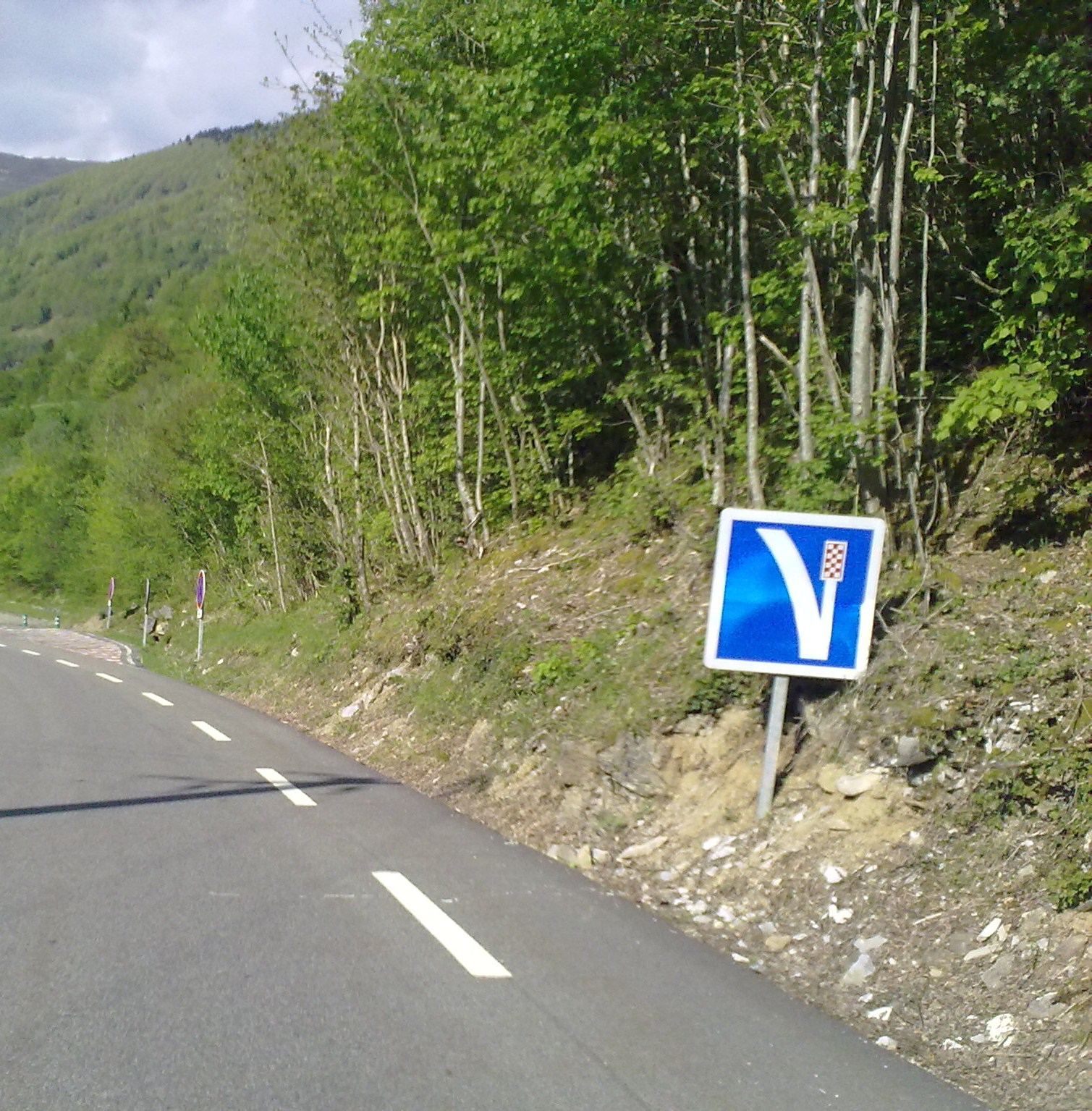 La E7 en France le 24 mai 2010.